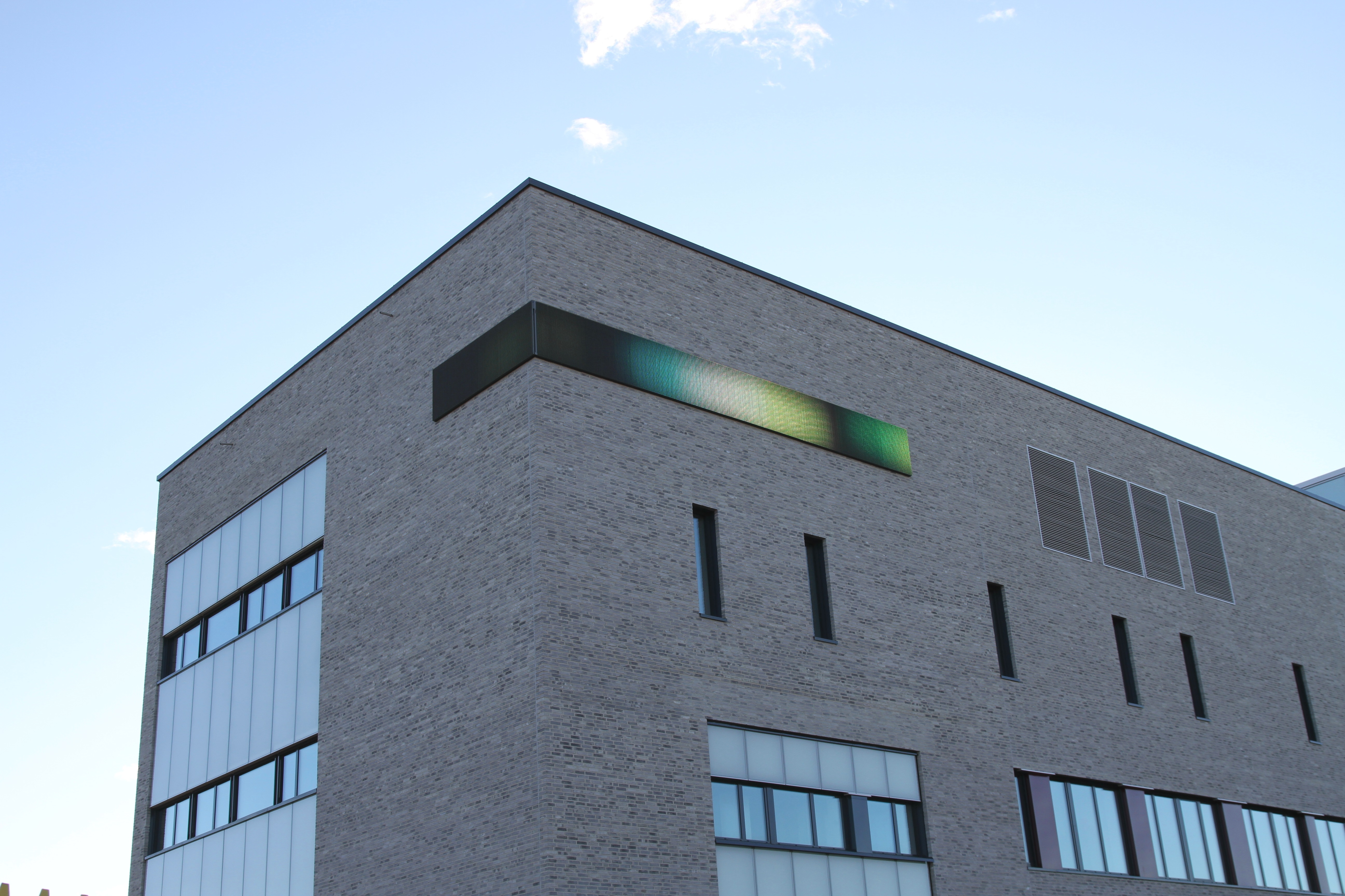 Brynseng skole i Oslo.